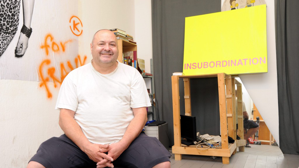 Frank Künster und sein erstes Kunstwerk in seiner Wohnung in Berlin-Wedding